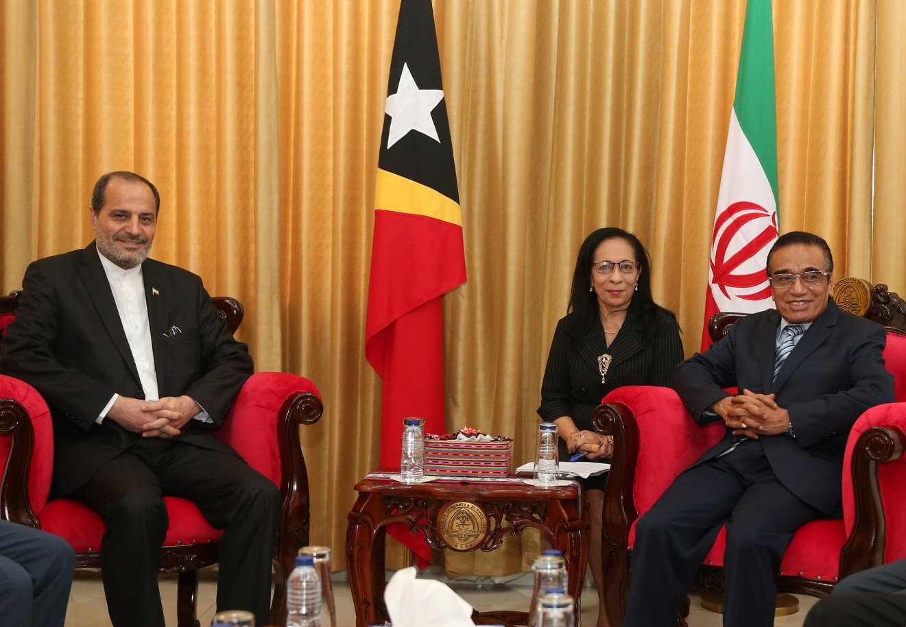 2020-02-20 Mohammad Khosh Heikal Azad, iranischer Botschafter in Osttimor, am Tag der Übergabe seiner Akkreditierung, mit Staatspräsident Francisco Guterres